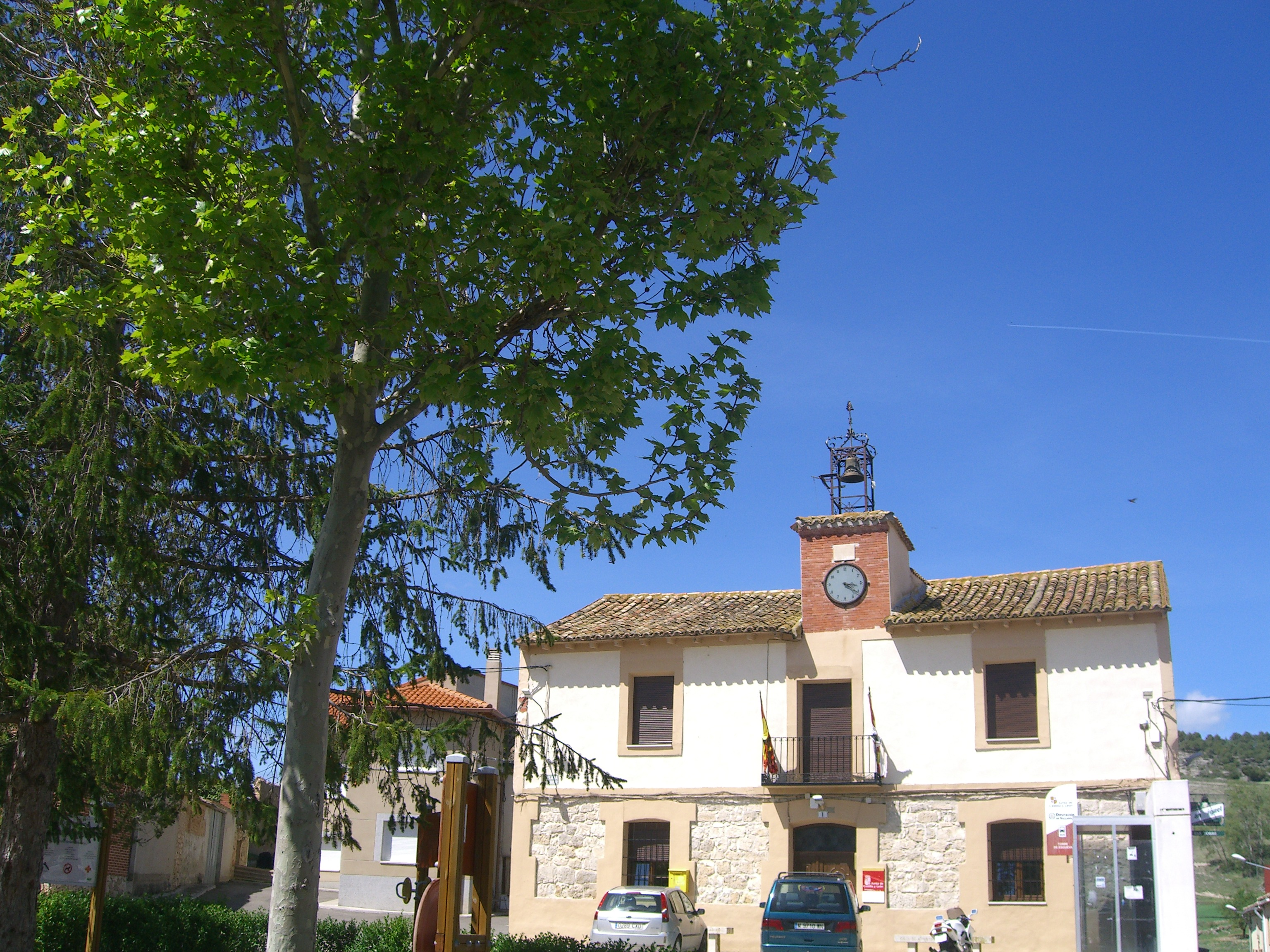 situado en la plaza mayor del pueblo